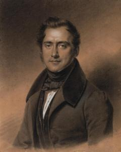 Князь Сергей Алексе́евич Долгору́ков (1809—1891)